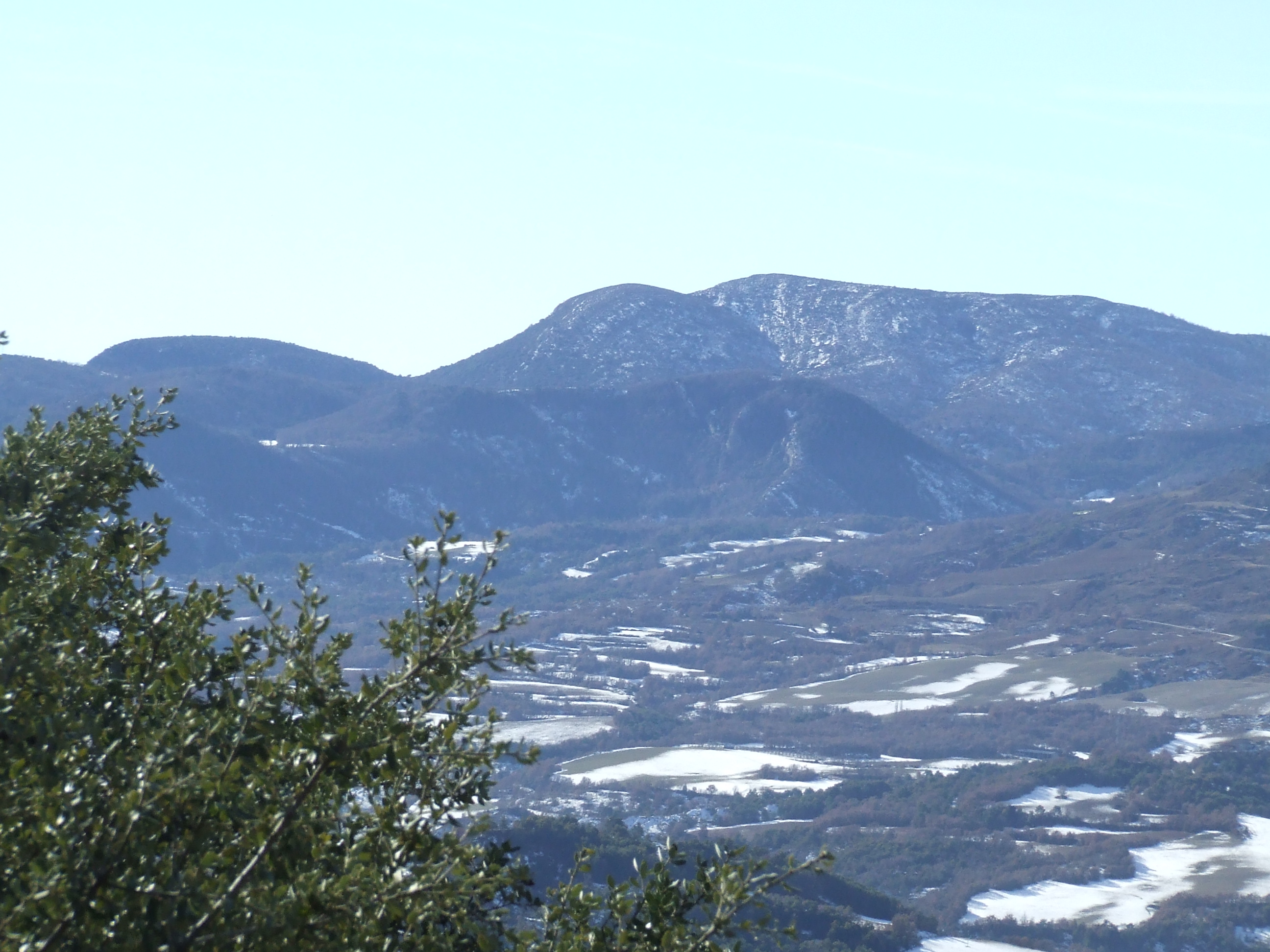 La Serra del Cucuc i el Montsec de Rúbies (Sant Salvador de Toló, Gavet de la Conca, Pallars Jussà)